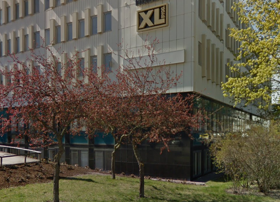 Bild på XL-BYGGs huvudkontor i Solna